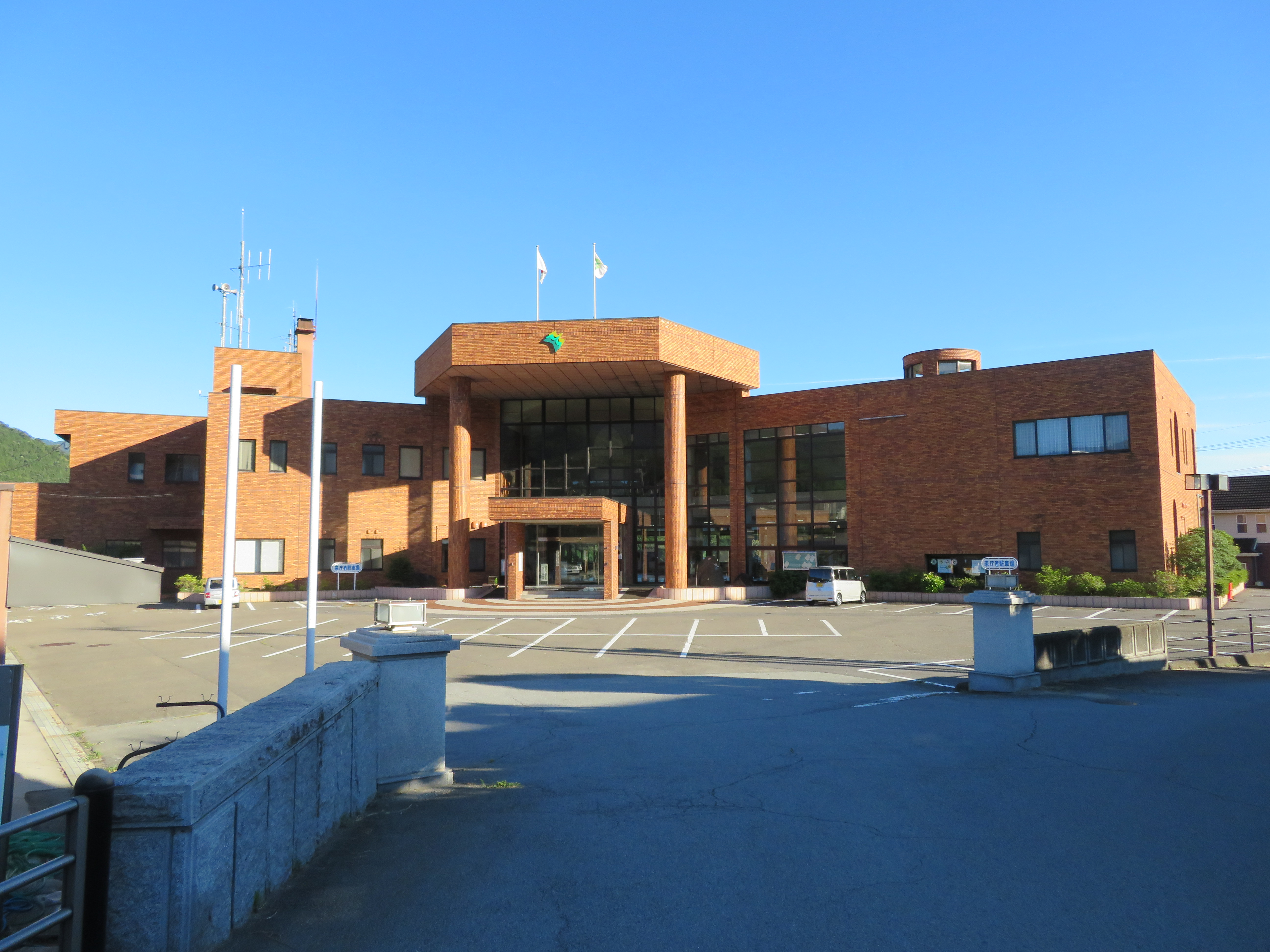 山梨市役所牧丘支所庁舎（旧牧丘町役場庁舎） Canon PowerShot SX720 HS